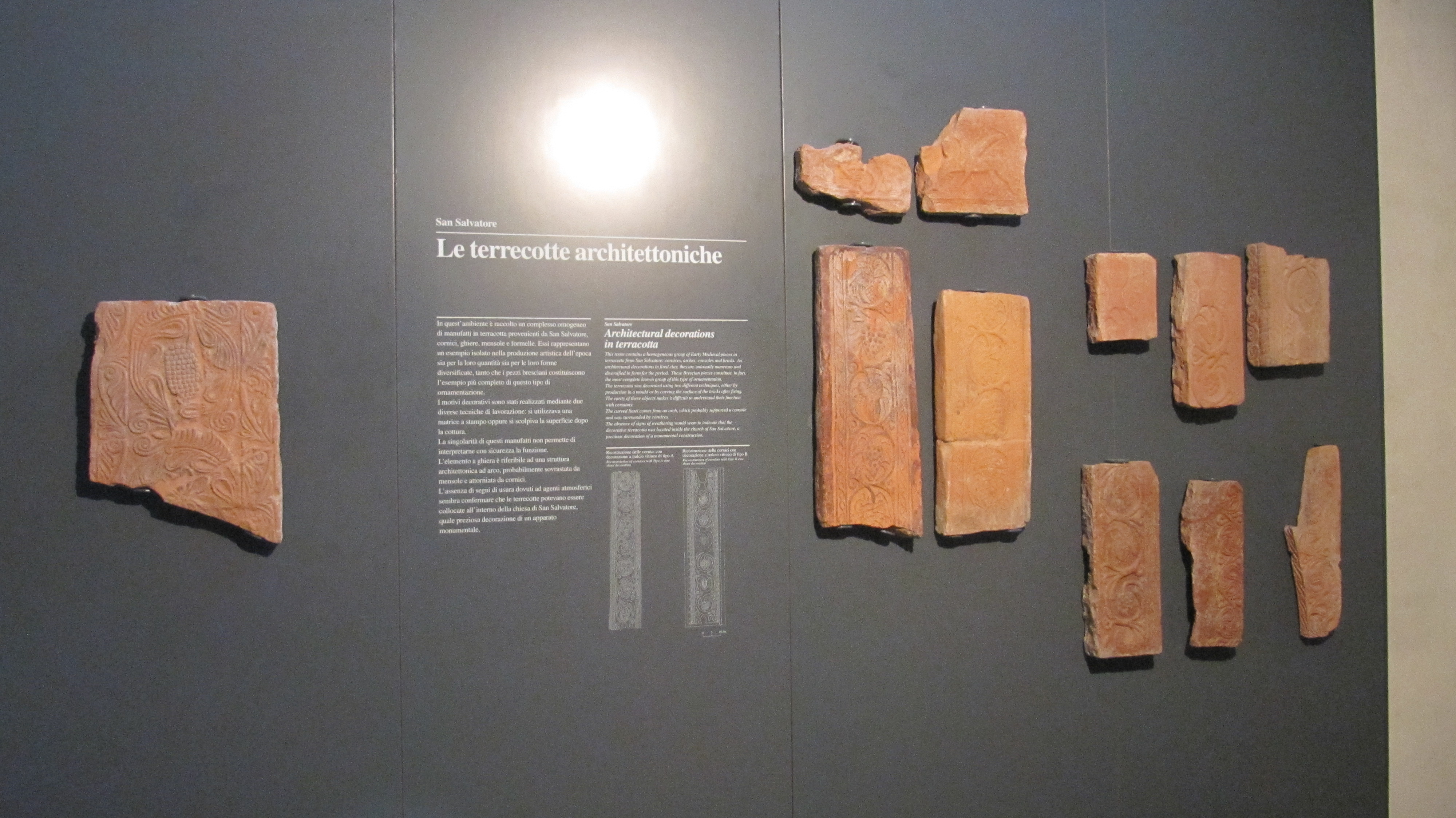 Terracotte architettoniche di San Salvatore, VIII secolo, museo di Santa Giulia, Brescia